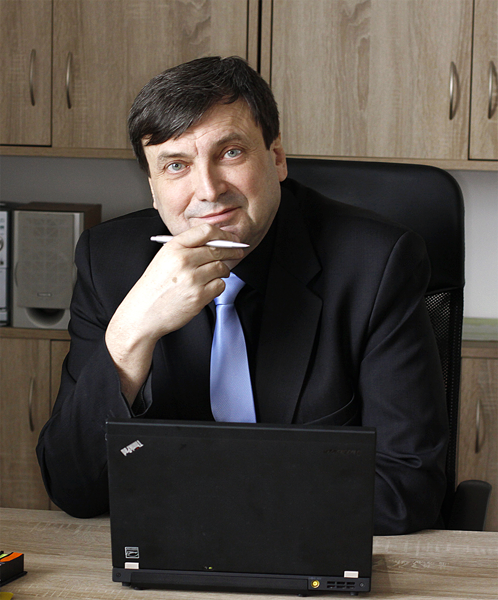 Oficiální portrét Karla Fiedlera